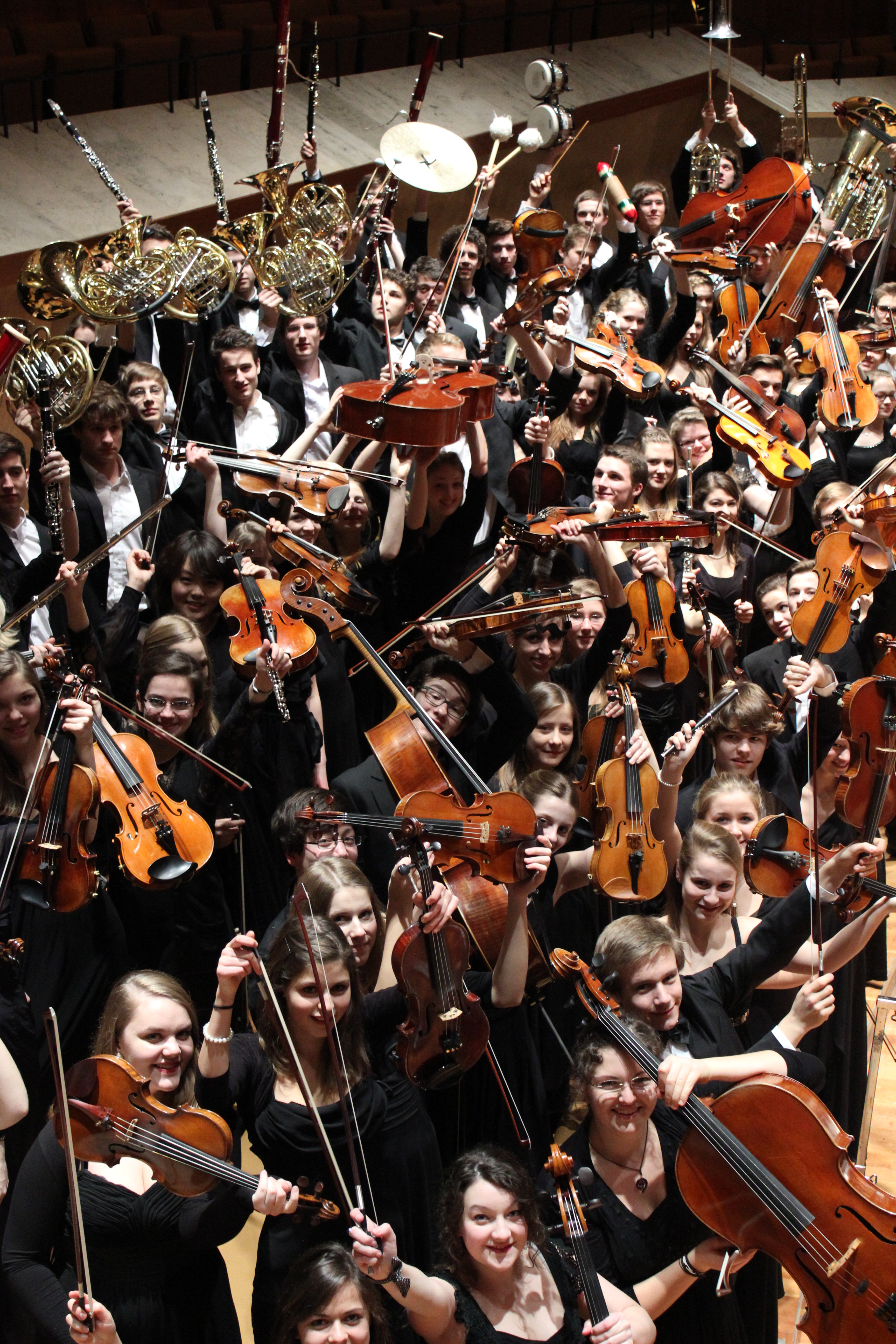 Gruppenfoto Bundesjugendorchester